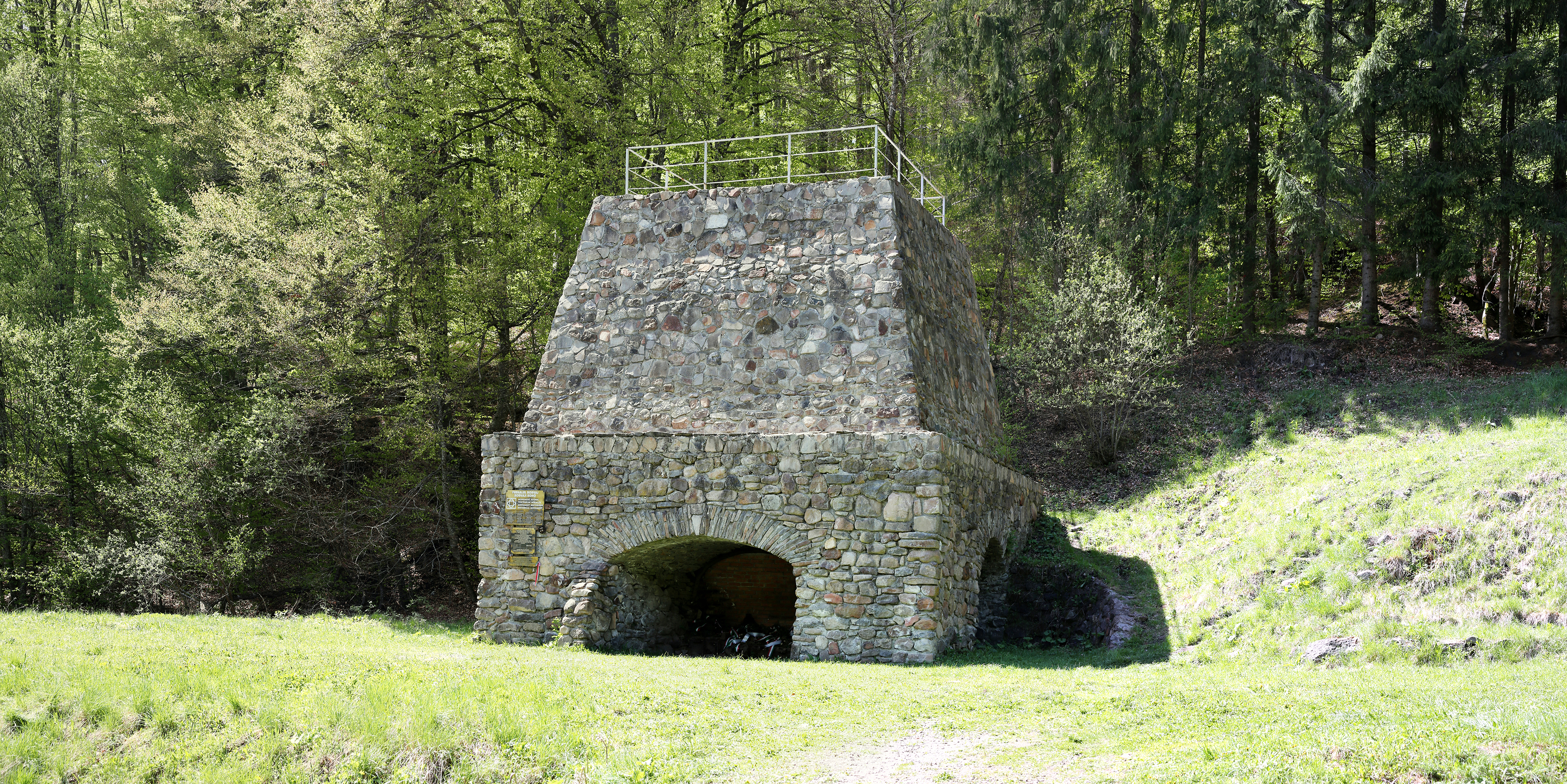 Furnalul Bodvaj